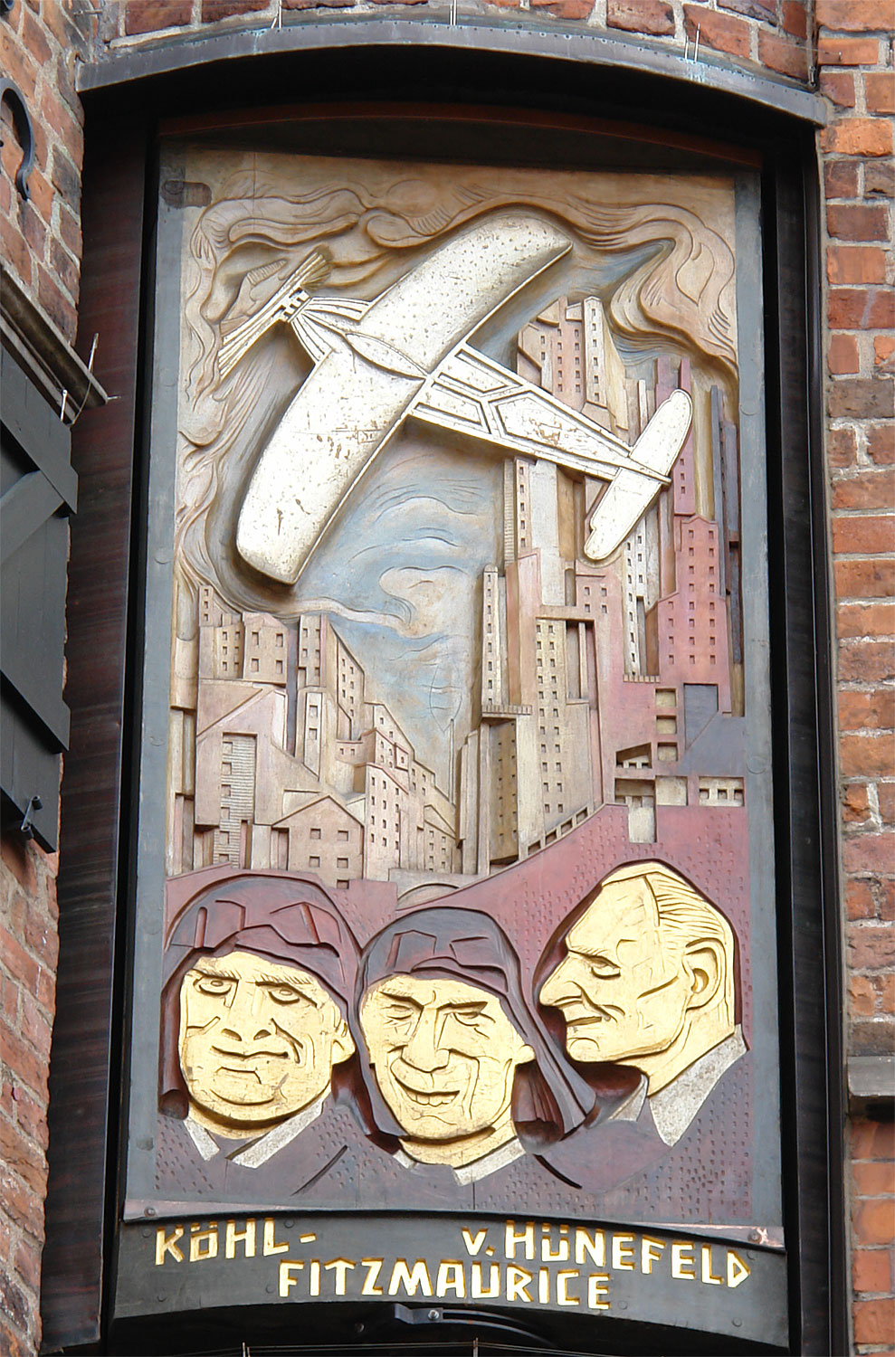 Bernhard Hoetger: Hauptmann Hermann Köhl, Oberst James C. Fitzmaurice, Ehrenfried Günther Frh. v.Hünefeld (1934, Ozean-Bezwinger auf 10 Bildtafeln). Standort: Haus des Glockenspiels in der Böttcherstraße, Bremen